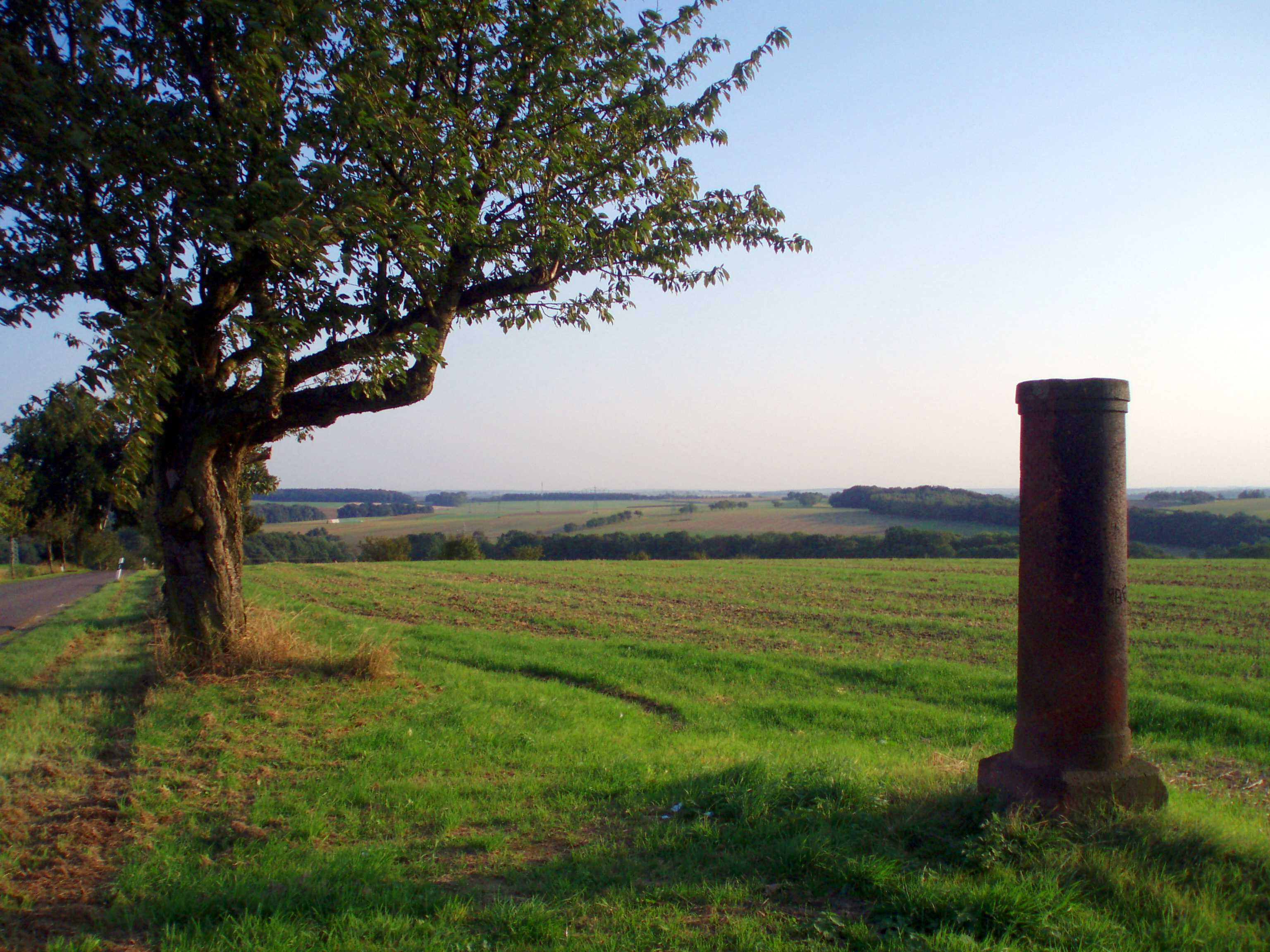 Vermessungssäule Nr. 119 "Sahlis b. Frohburg" bei Kohren-Sahlis